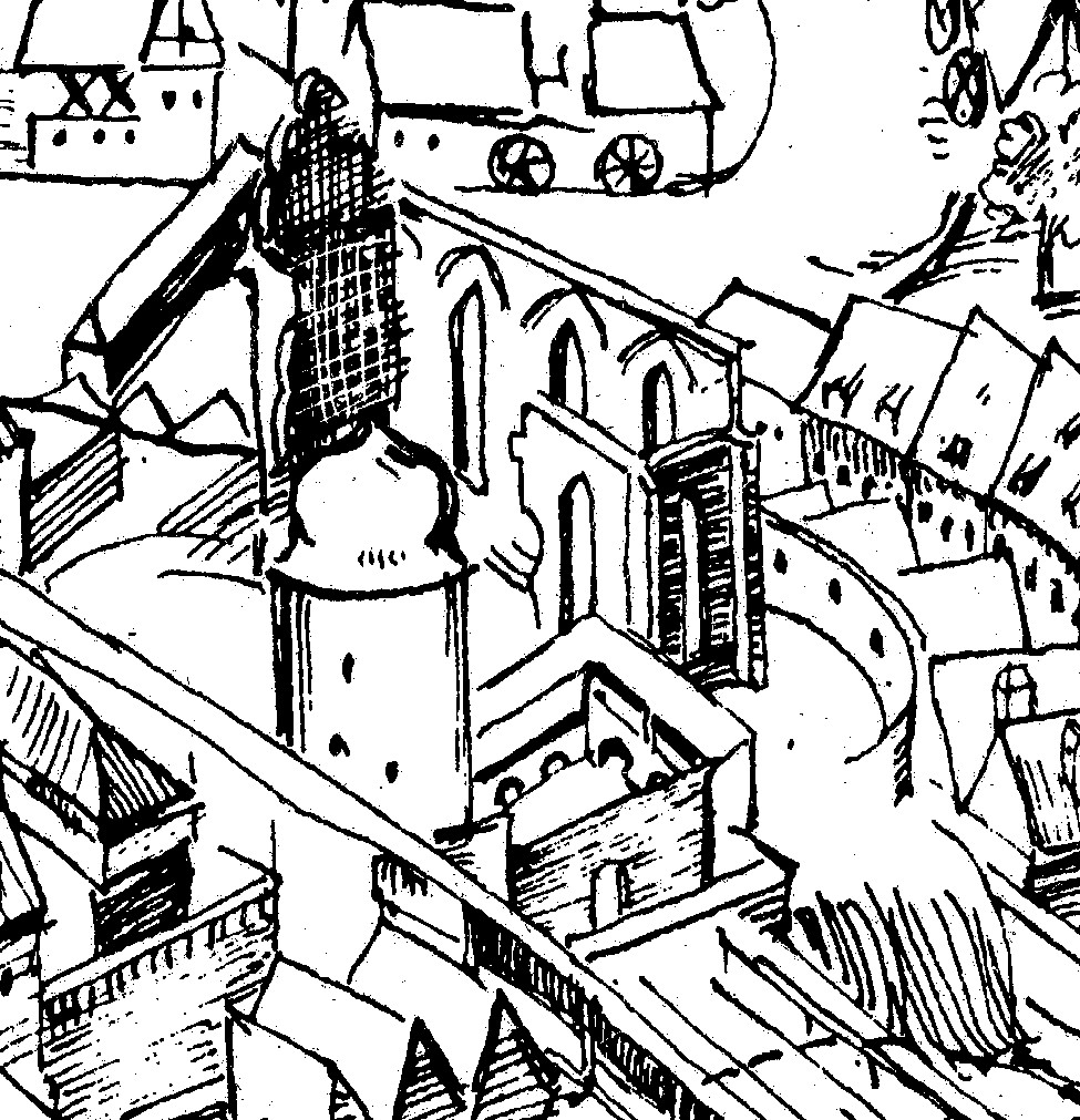 Nicolaiturm und -kirche in Bautzen; Darstellung auf dem Schreiberplan. Hornjoserbsce: Mikławska wěža a ruina Mikławskeje cyrkwje na Schreiberowym planje z lěta 1700.